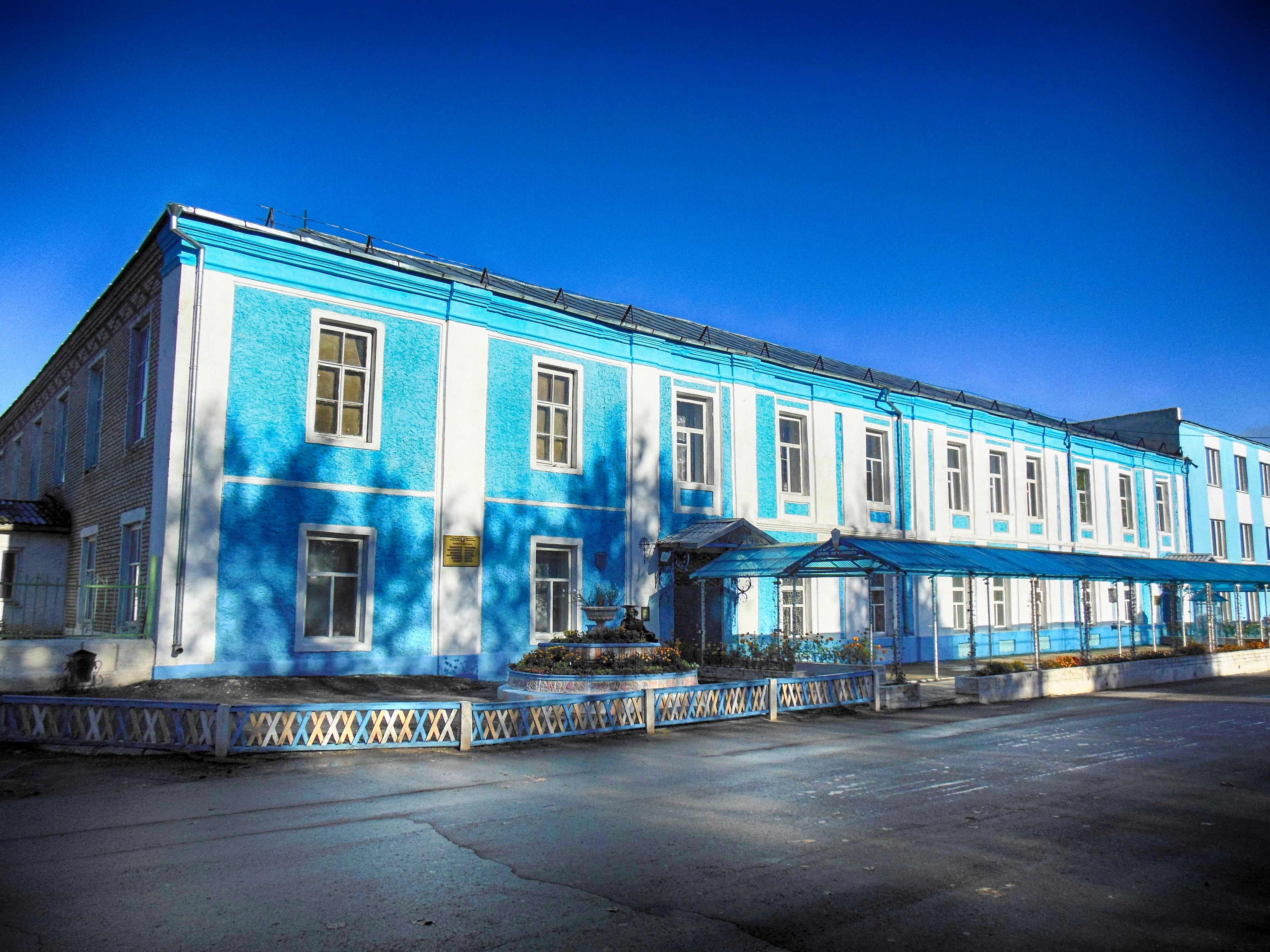 Беларуская (тарашкевіца): Мсьціслаў, павятовая вучэльня